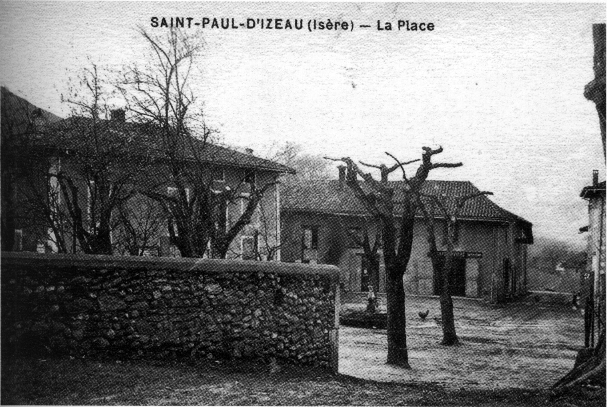 Saint-Paul-d'Izeaux, la place, en 1910